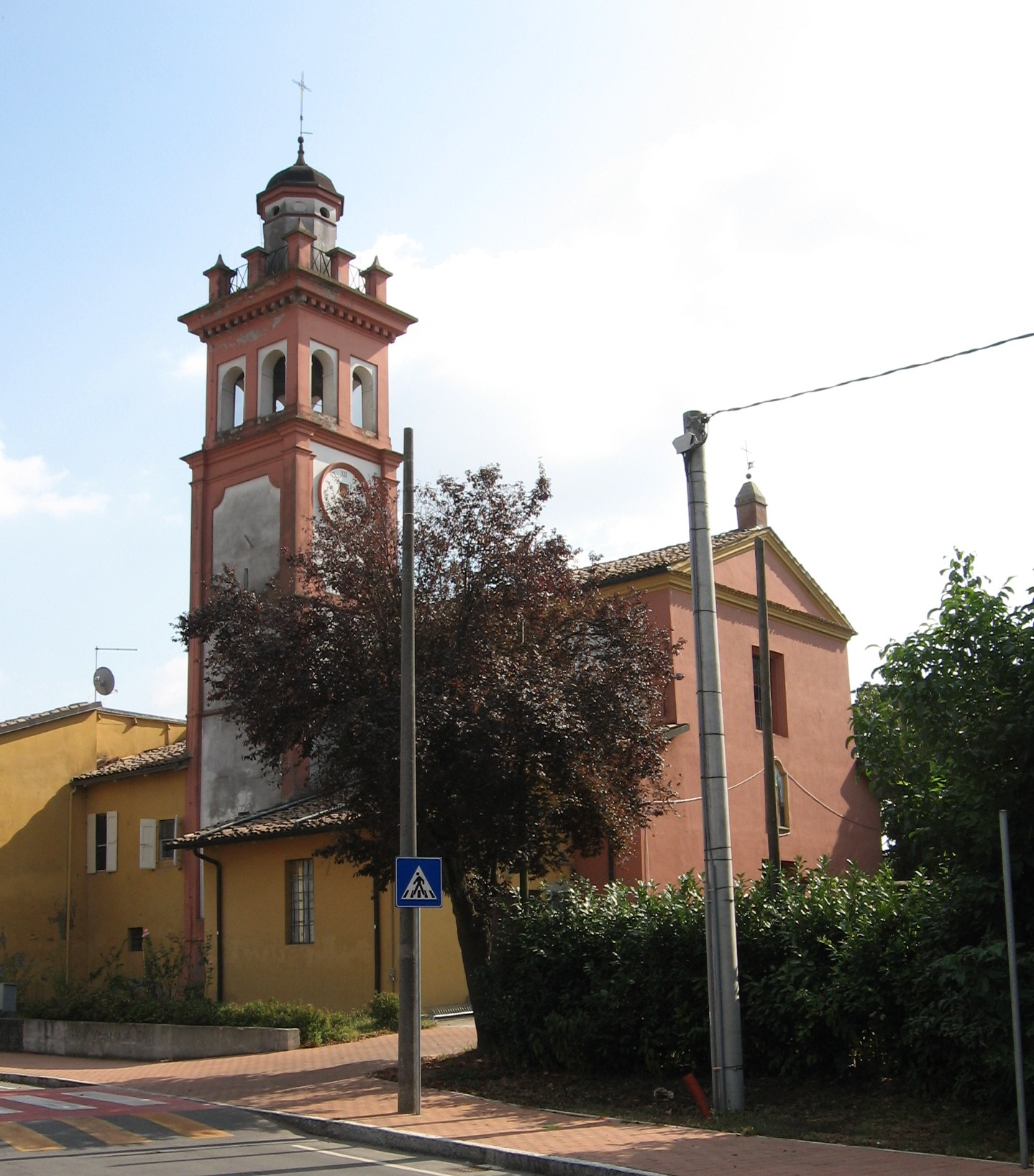 Chiesa di San Silvestro - Casale di Mezzani